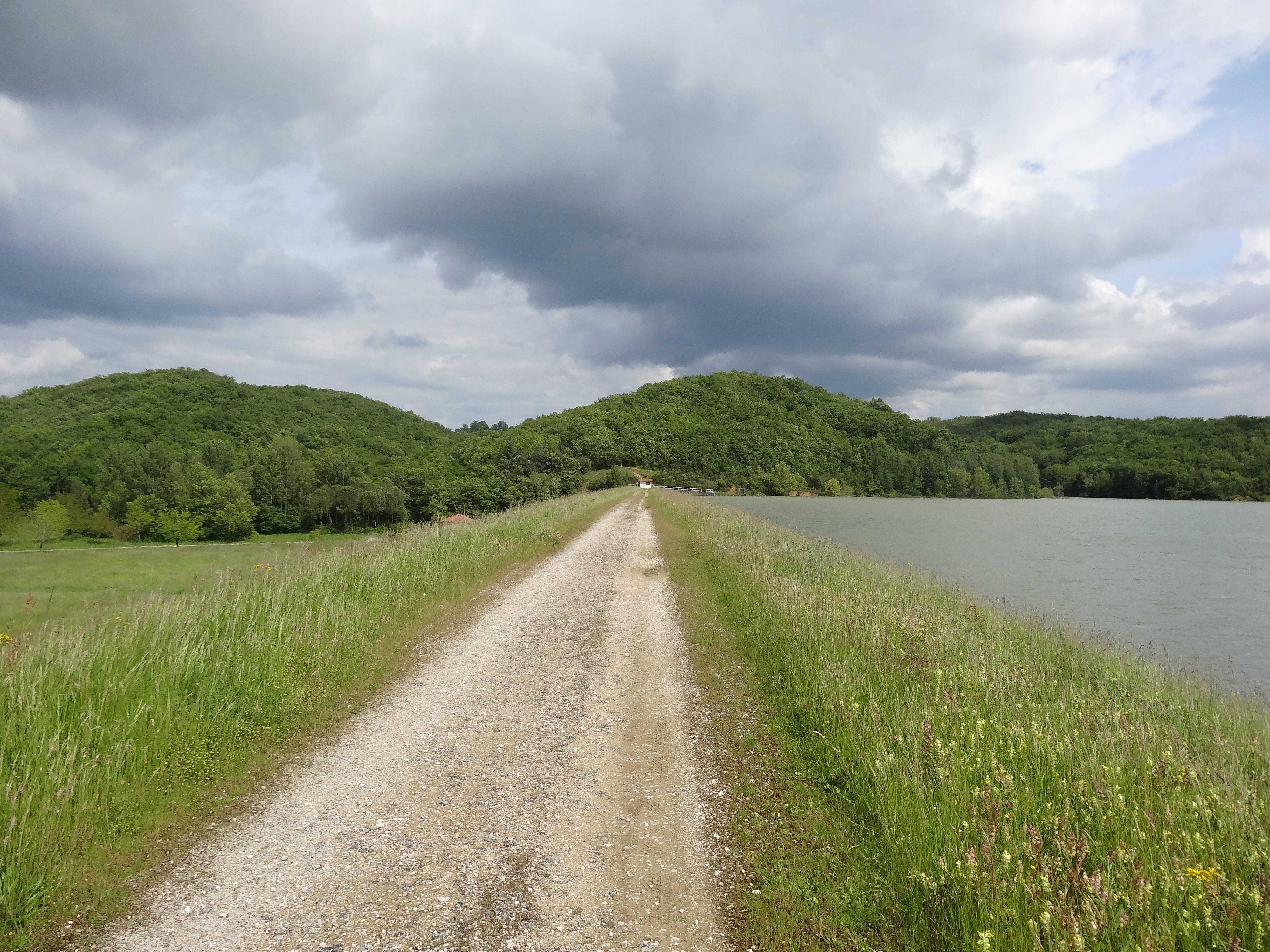 Digue artificielle